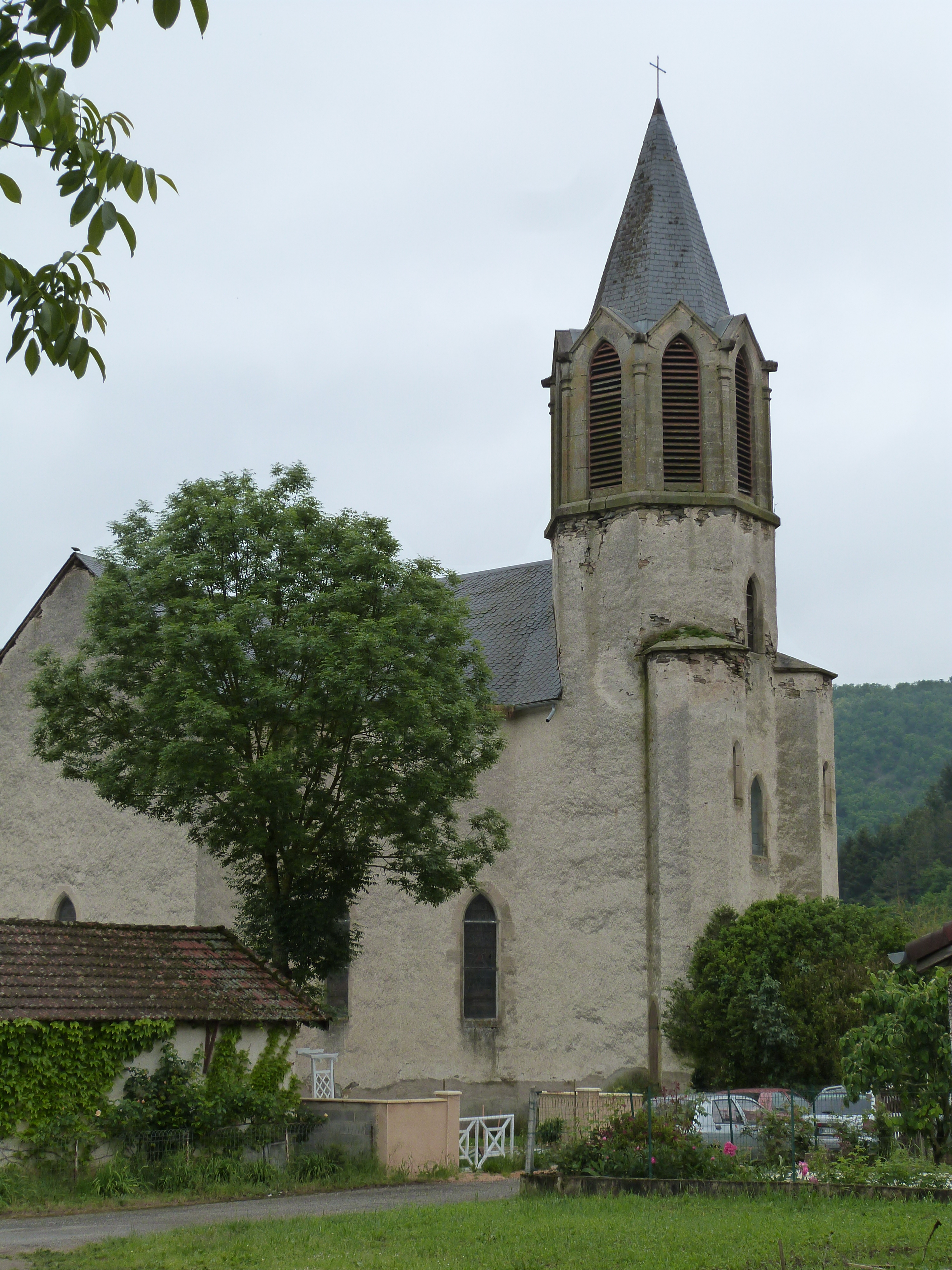 Vue depuis le sud-ouest de l'église Notre-Dame de Monteils (Aveyron)